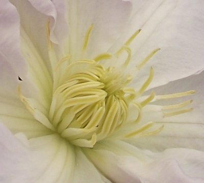 Etamine de evipo003